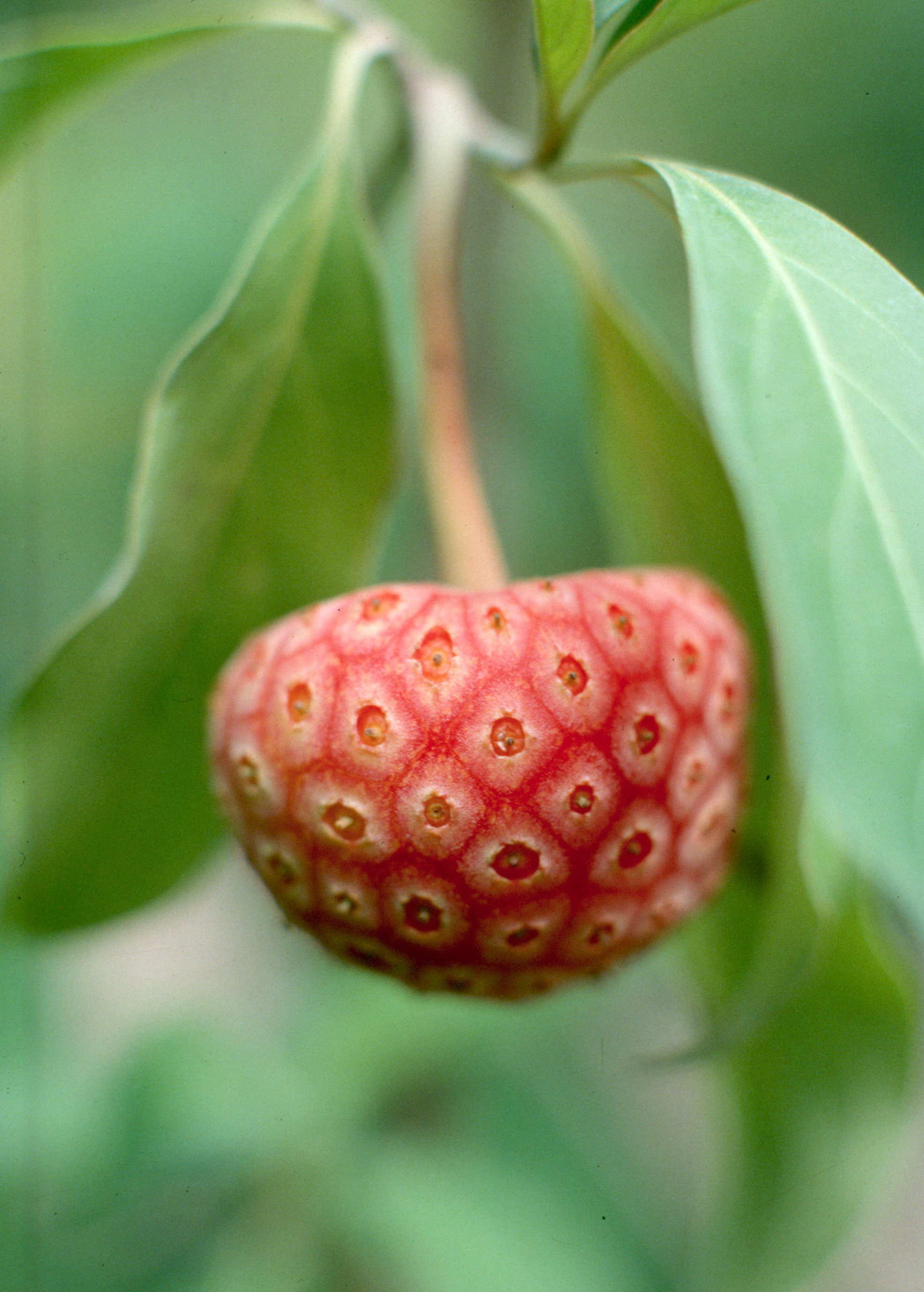 Cornus capitata. Real Jardín Botánico de Madrid.